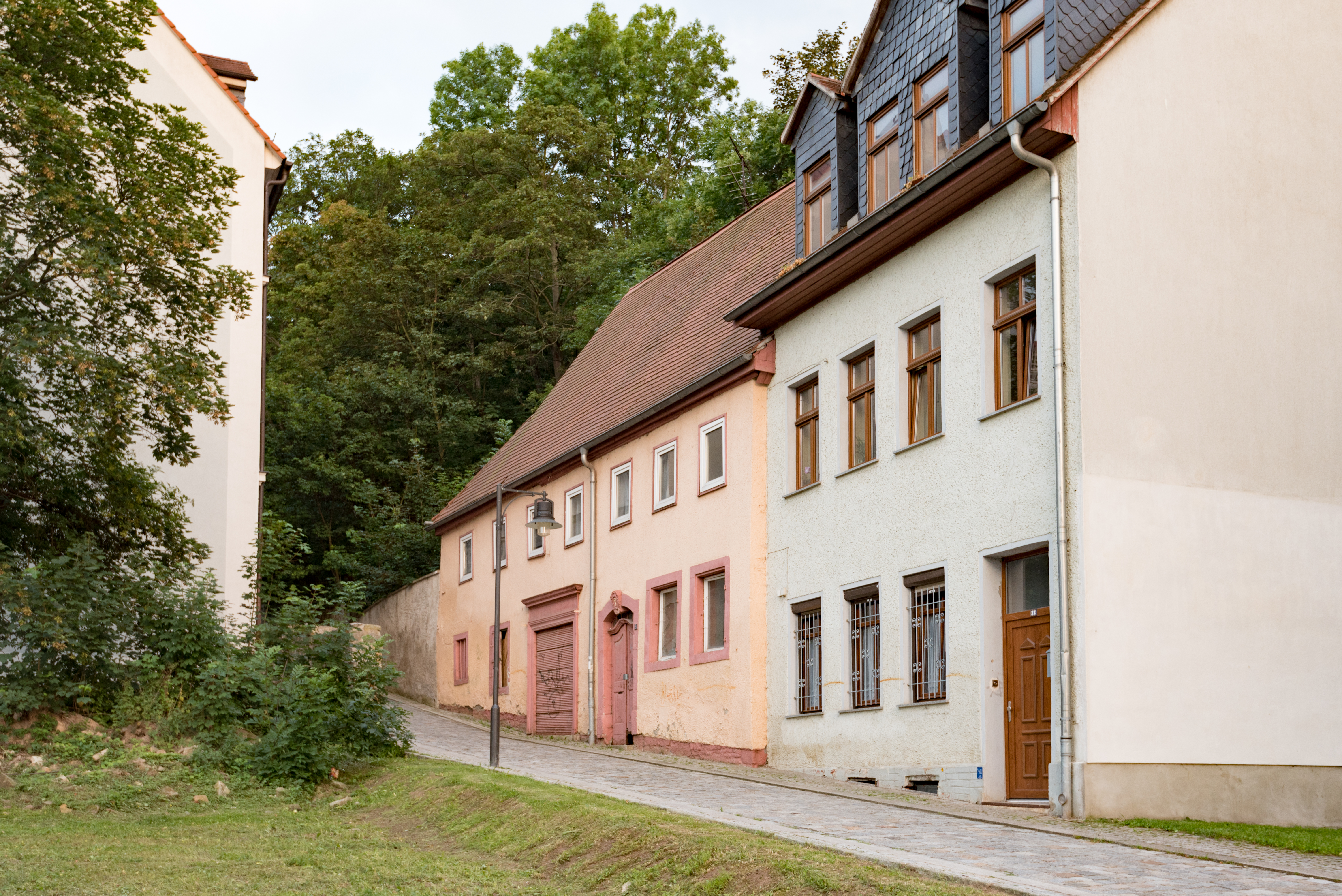 Weißenfels, Schloßgasse 3